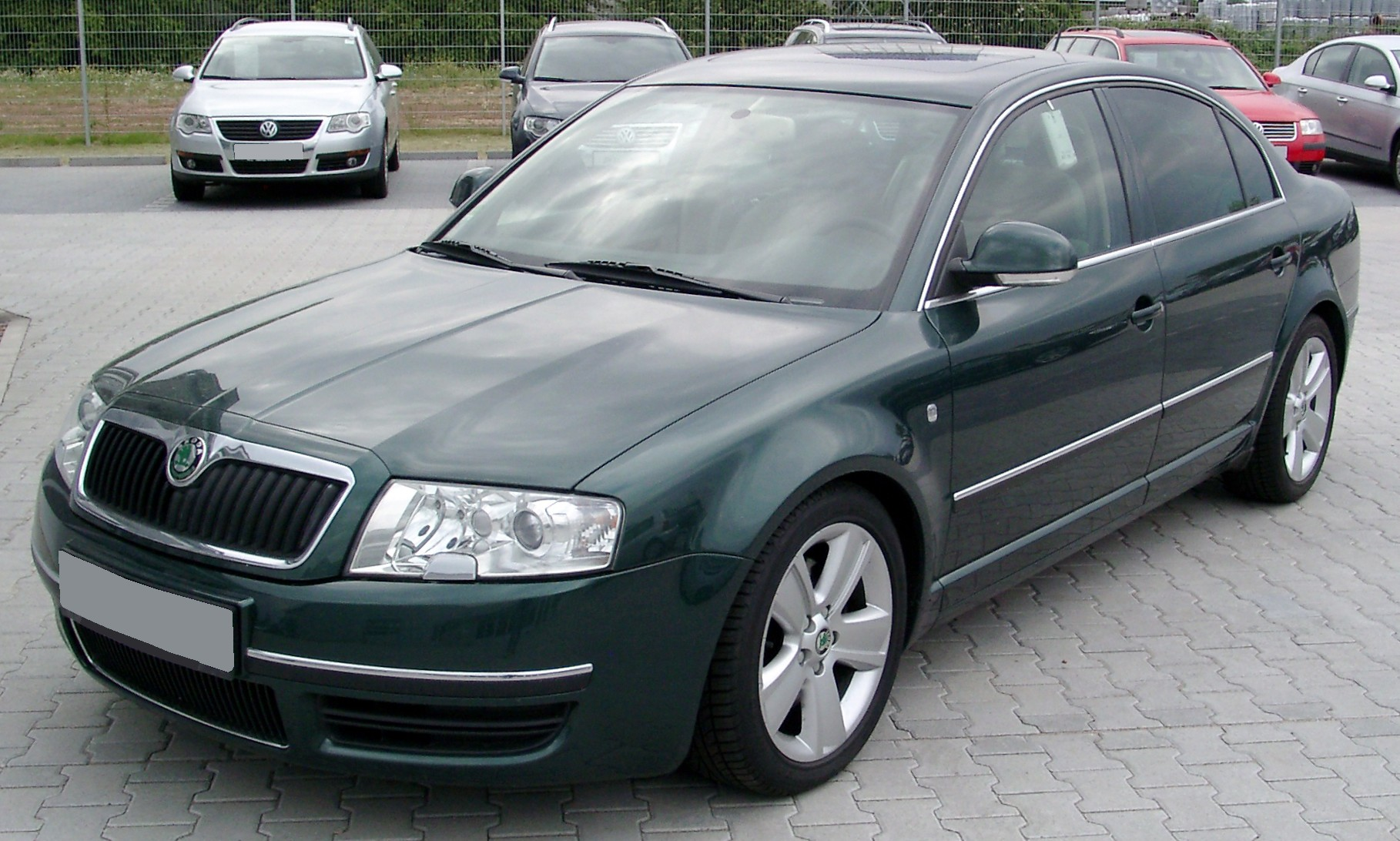 Škoda Superb, 1. Generation